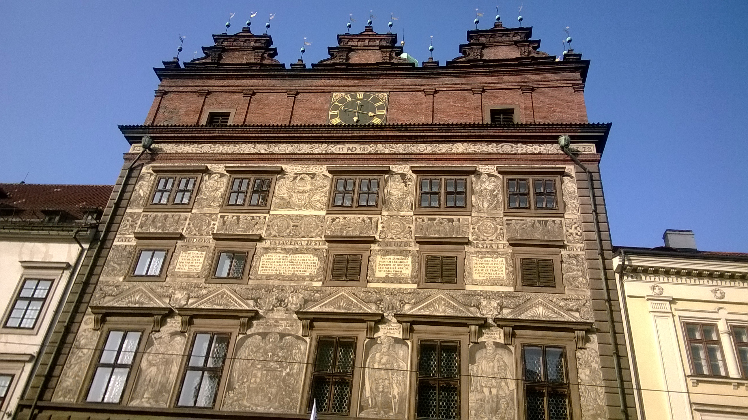 Radnice v Plzni